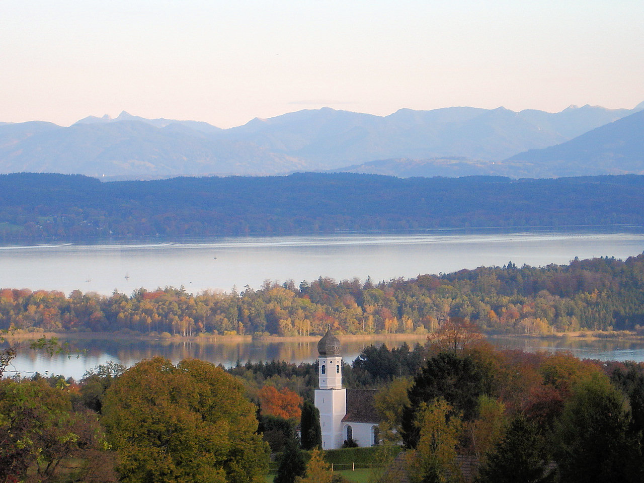 Blick von der Ilkahöhe an einem föhnigen Herbstnachmittag.